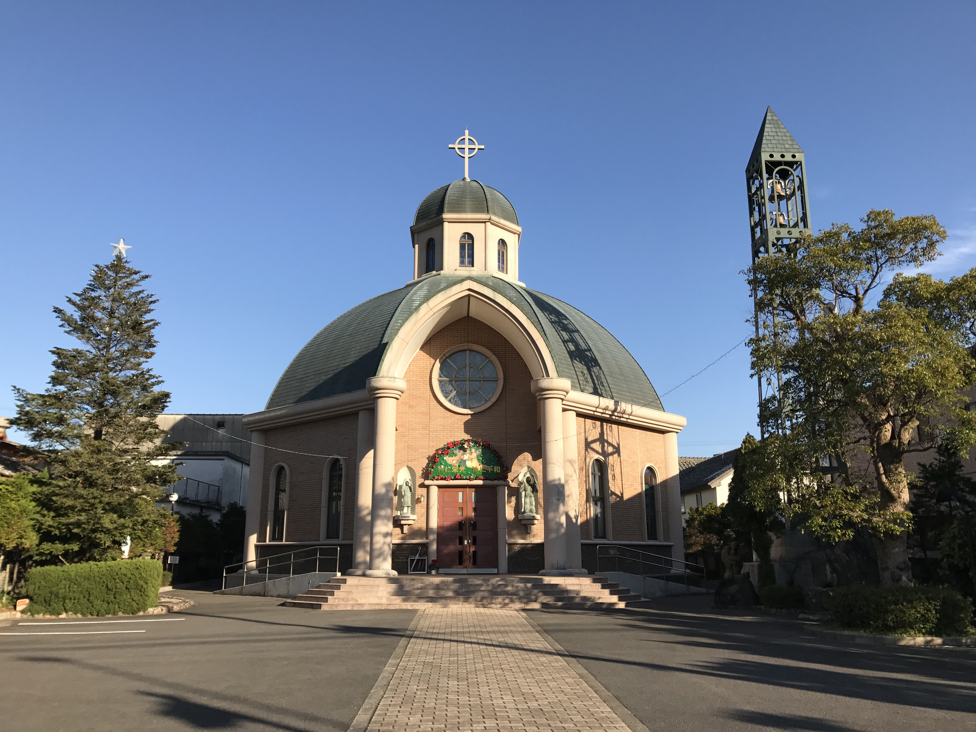 カトリック島原教会